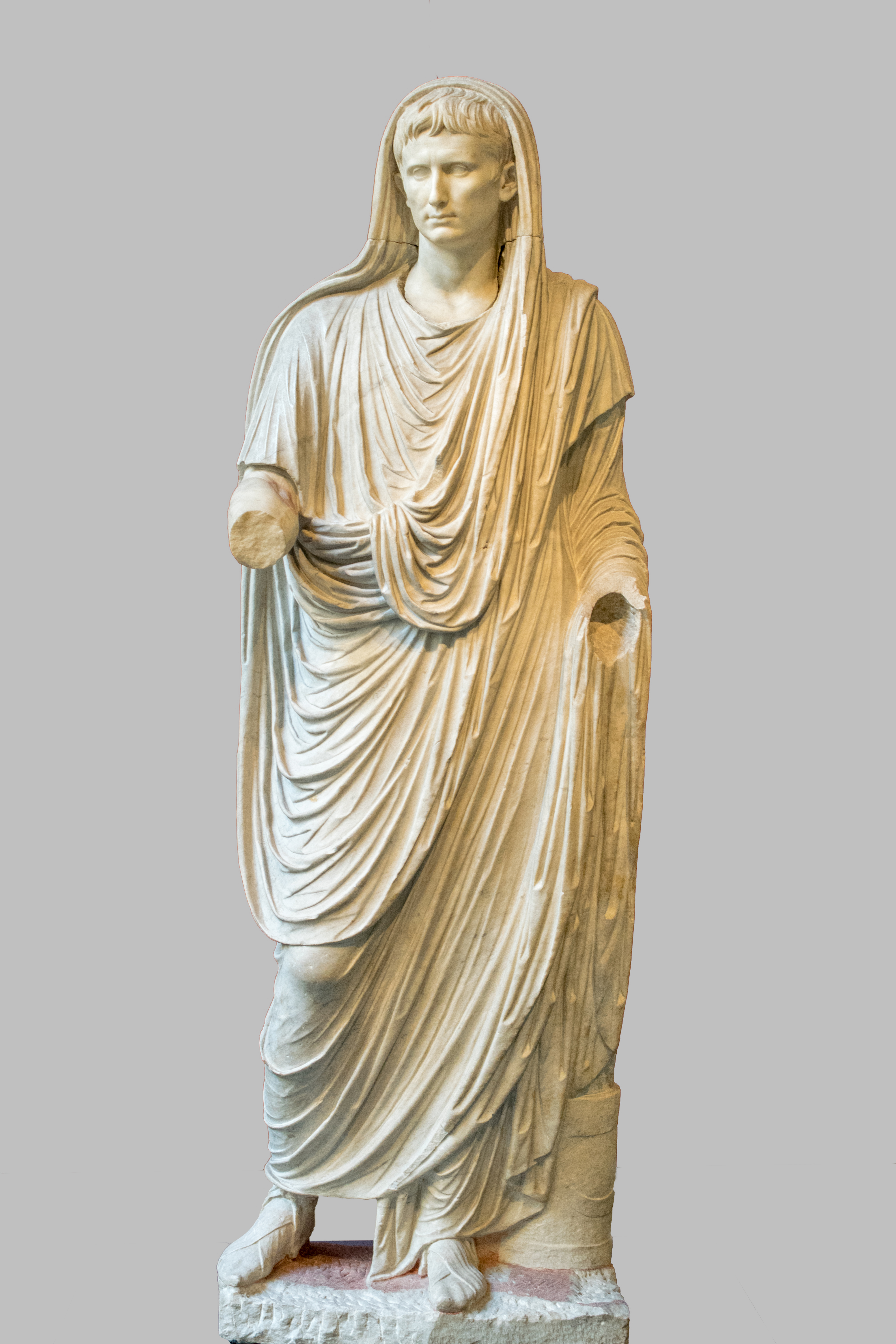 Die Statue stellt den ein Opfer darbringenden Kaiser Augustus als Pontifex Maximus dar, der mit bedecktem Haupt in einer traditionellen Toga und mit Patrizierschuhen (calcei patricii) gekleidet ist. Neben dem linken Bein befindet sich ein Behälter (capsa), der zur Aufbewahrung amtlicher Dokumente dient. Der Kopf mit seinen realistischen Zügen, ist als ein separates Stück gearbeitet und auf dem Torso eingefügt. Die Statue, die allgemein als ein Werk der späten augusteischen Zeit betrachtet wird, stammt wahrscheinlich aus dem letzten Jahrzehnt des 1. Jahrhunderts v. Chr.